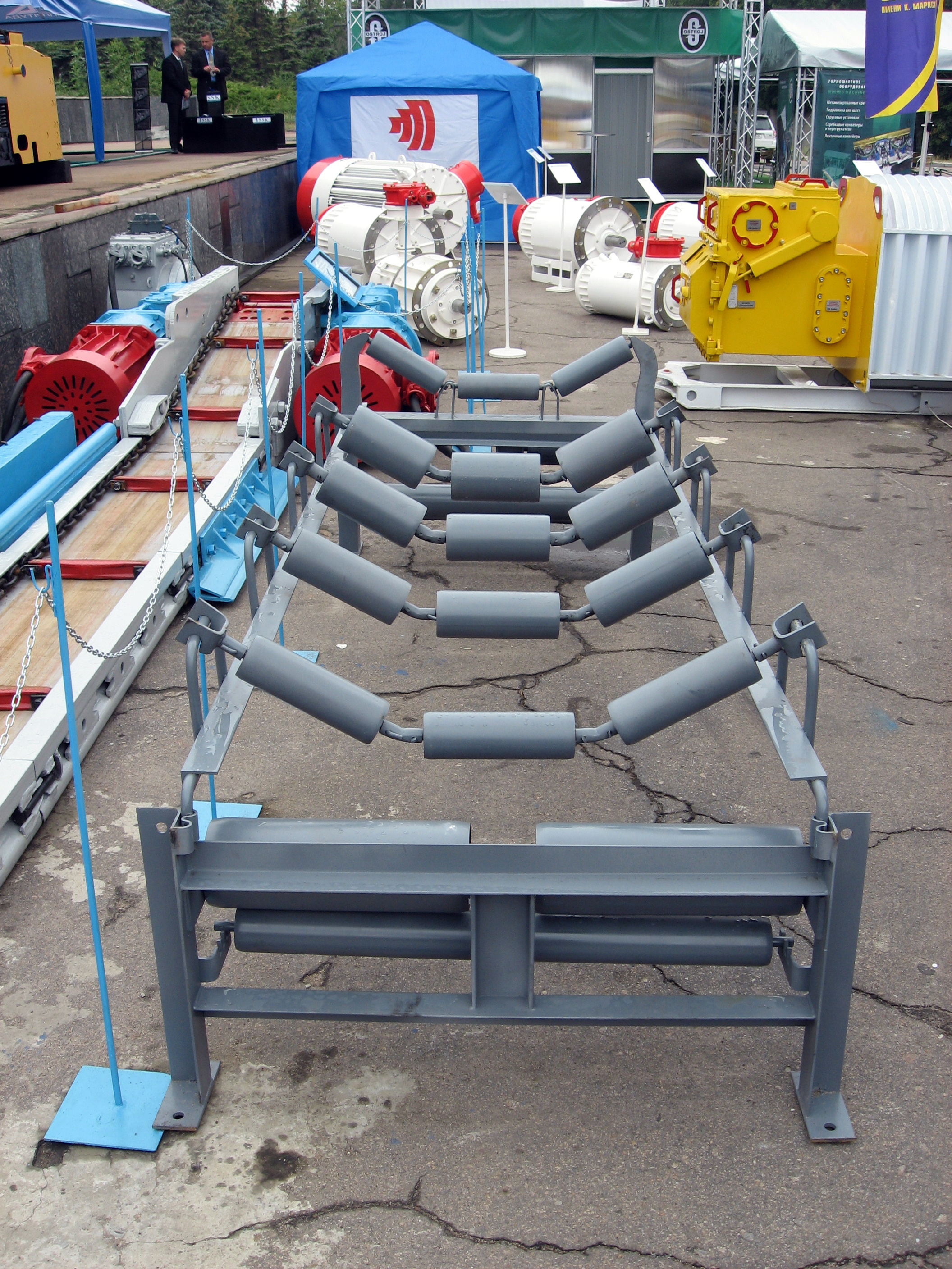 Фото з виставки Вугілля-Майнінг 2010